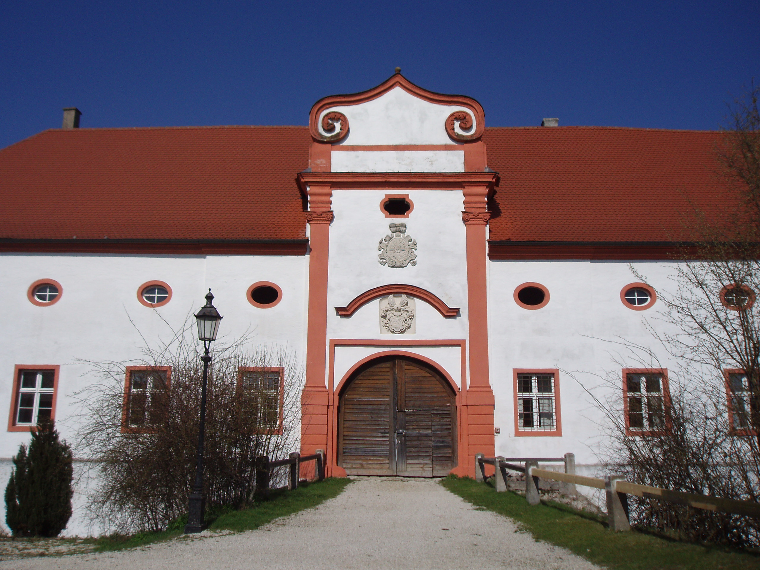 Stopfenheim, LK Weißenburg-Gunzenhausen, Deutschordensvogtei von 1716; mit Wappen eines Hochmeisters und eines Landkomturs des Deutschen Ordens